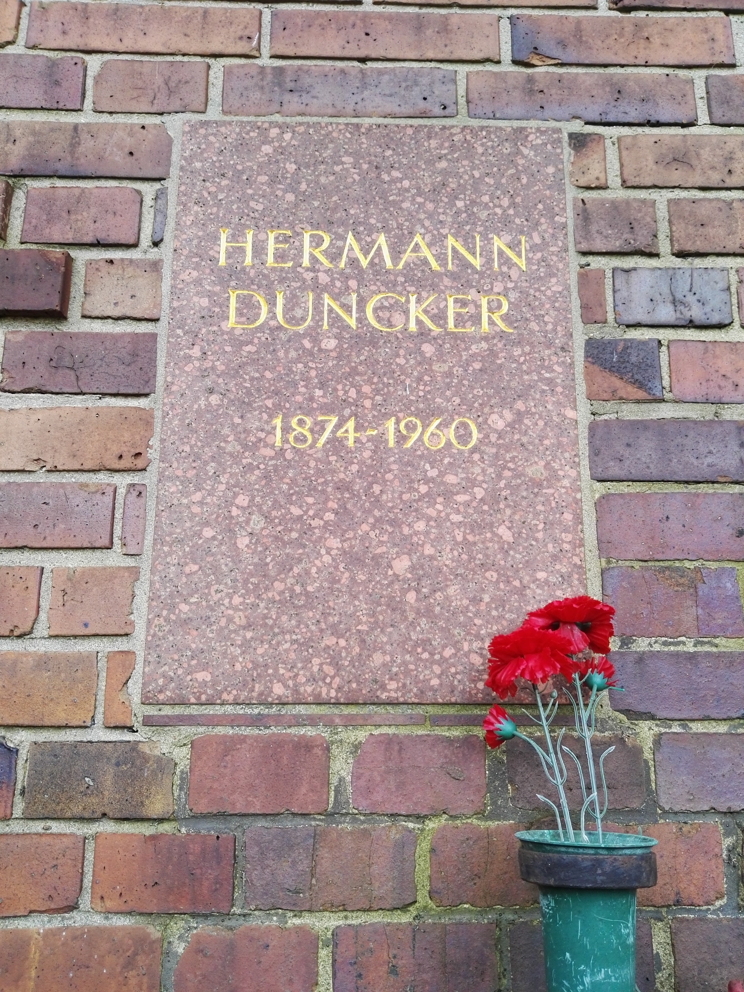 Grab von Hermann Duncker in der Gedenkstätte der Sozialisten auf dem Zentralfriedhof Friedrichsfelde in Berlin-Lichtenberg